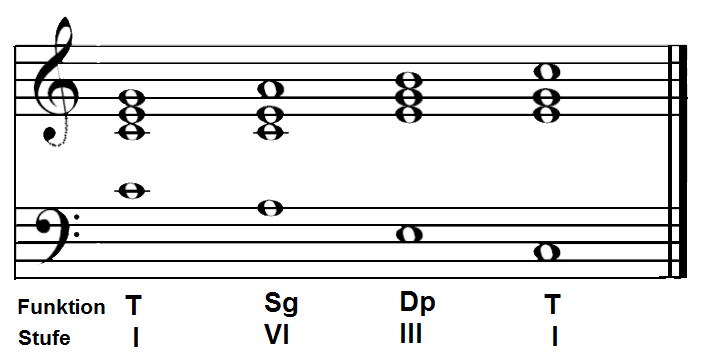 Kadenz, die anstelle der Hauptfunkionen Nebenfunktionen verwendet